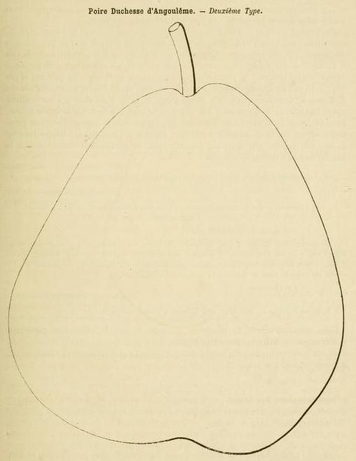 Duchesse d'Angoulême, 2è type, Dictionnaire de pomologie, 1867, André Leroy (1801-1875).